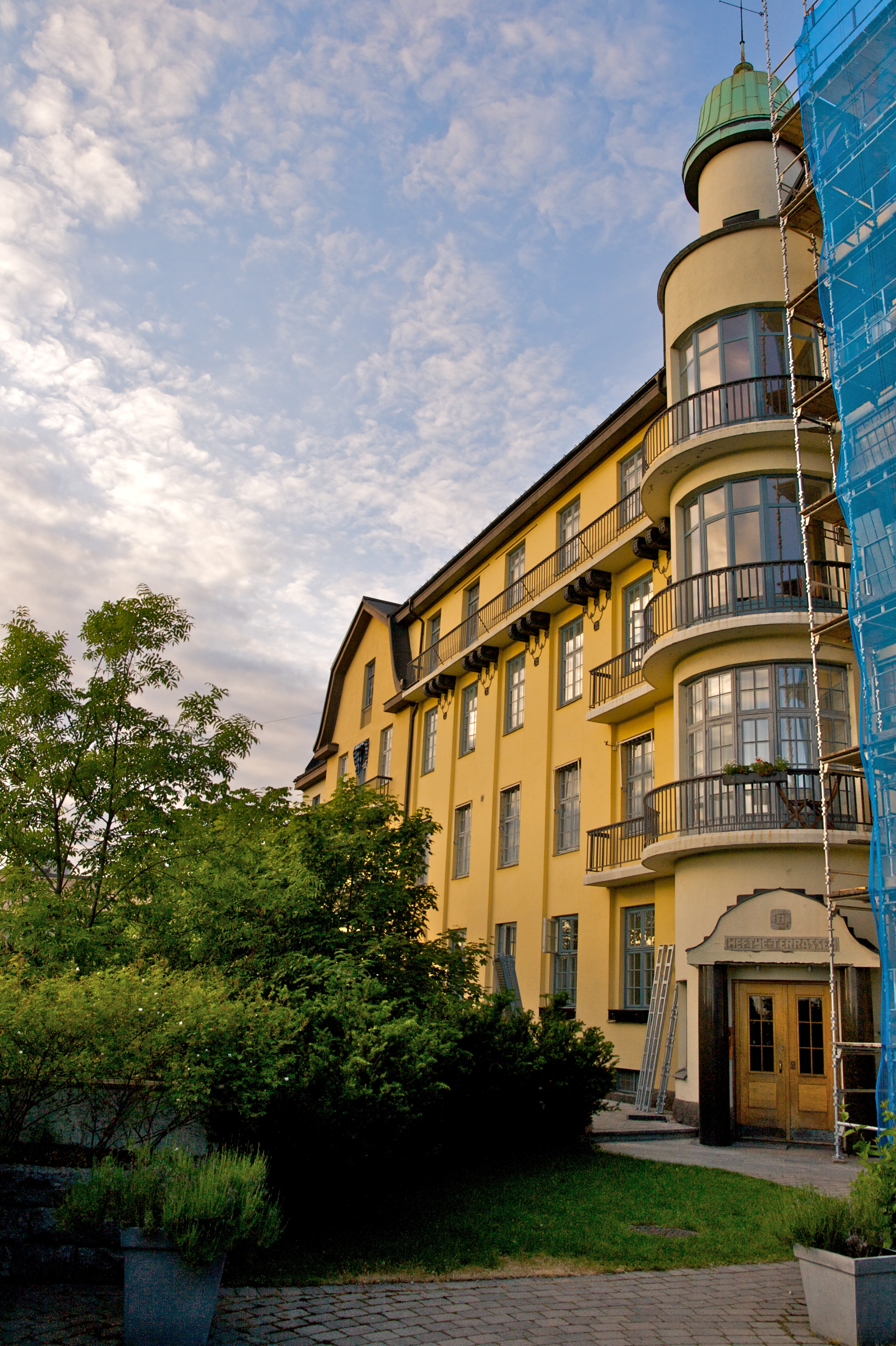 Fra Heftyeterrassen, Thomas Heftyes gate 42 på Gimle / Frogner i Oslo.